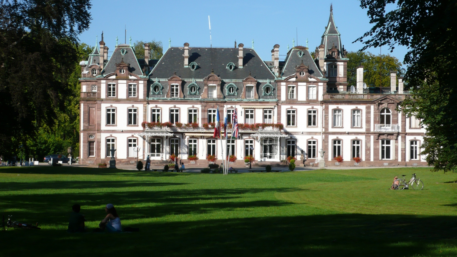 Château de Pourtalès Strasbourg Robertsau